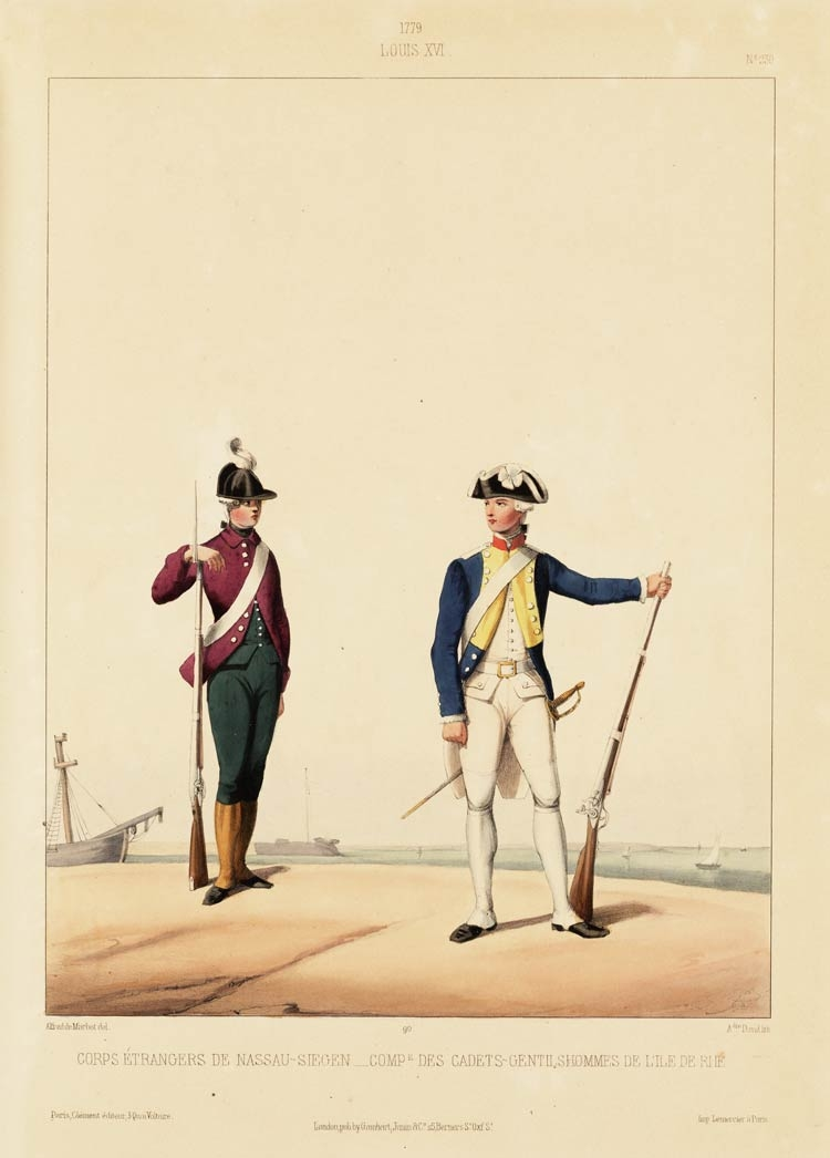 Мундиры добровольного (иностранного) корпуса де Нассау-Зиген и роты дворян-кадетов Иль-де-Ре в 1779 году.